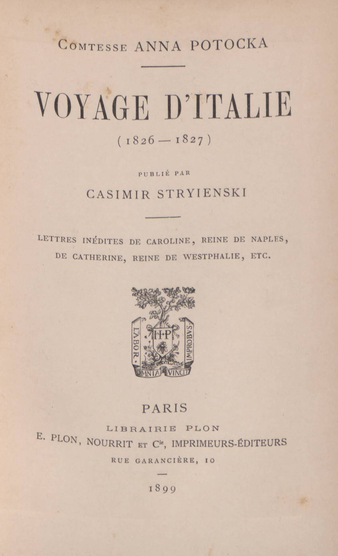 Frontespizio